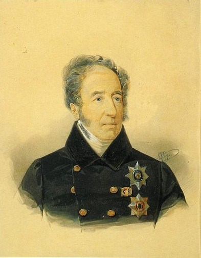 Граф Юрий Александрович Головкин (1764-1846)